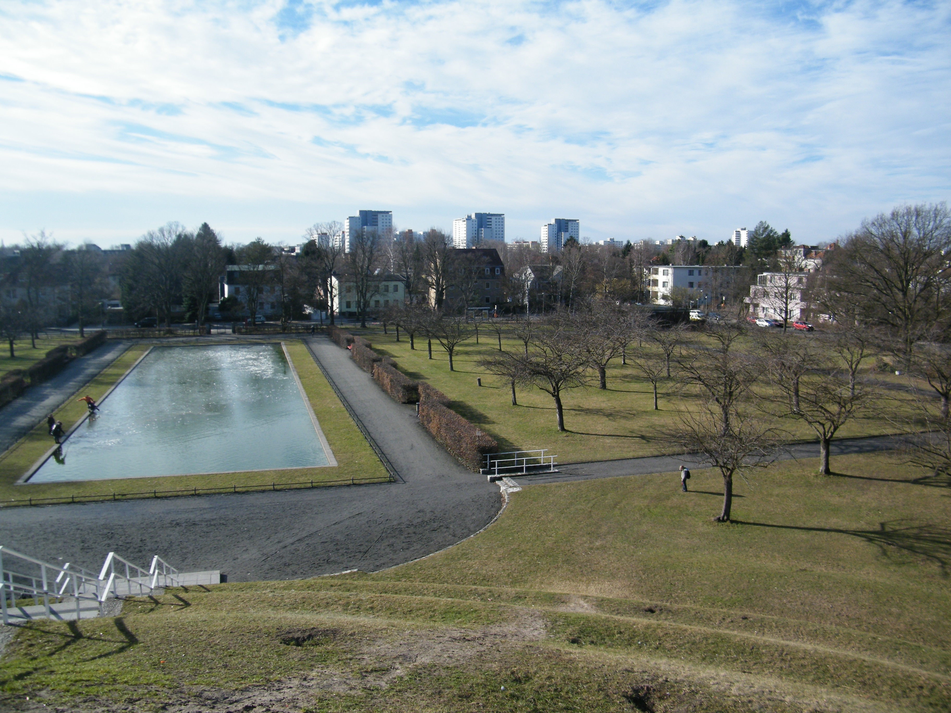 Blick vom Fliegeberg Unknown